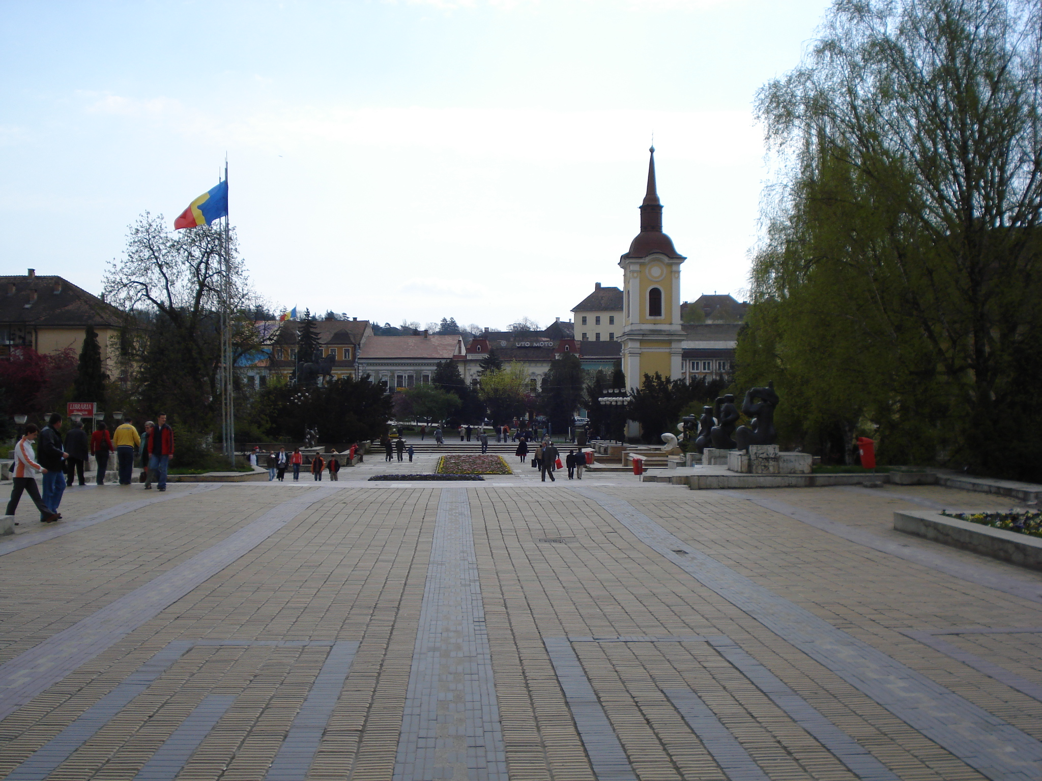 Piaţa Teatrului